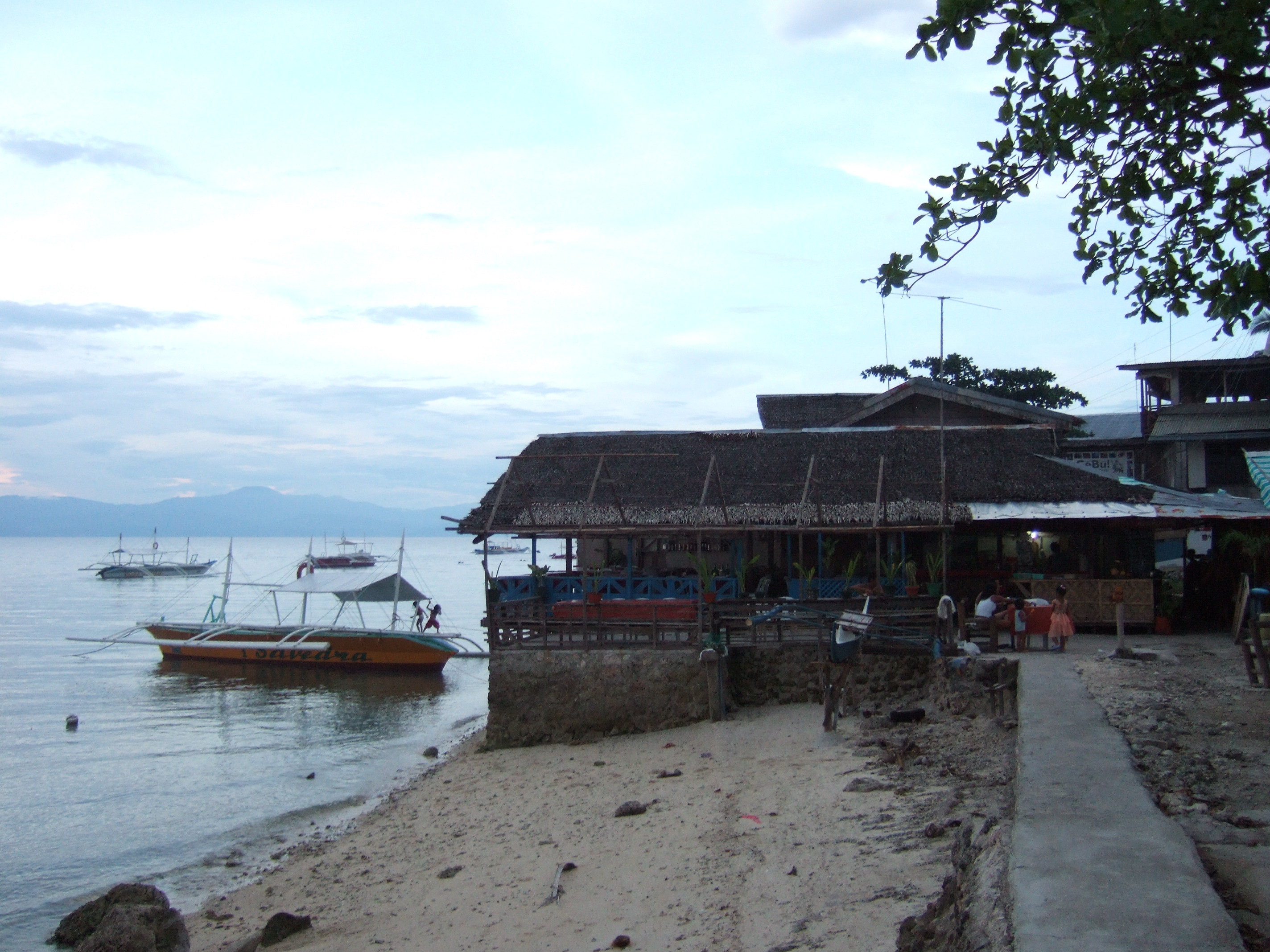 Moalboal, Cebu, Philippines